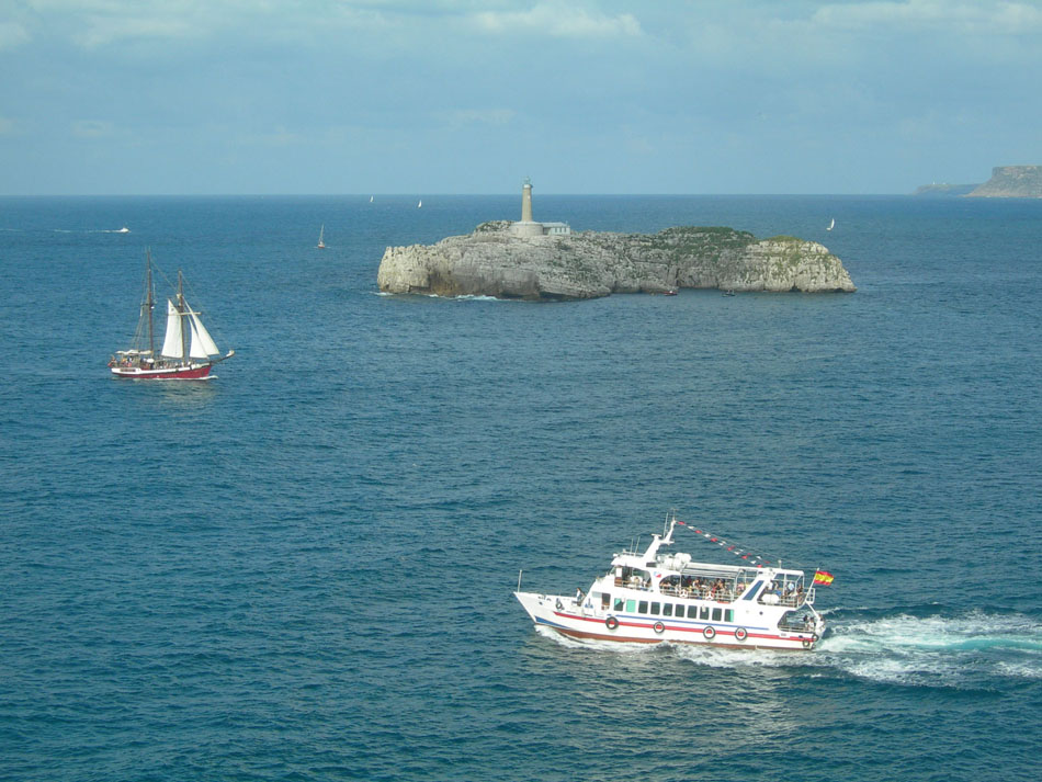 Isla de Mouro (Santander)